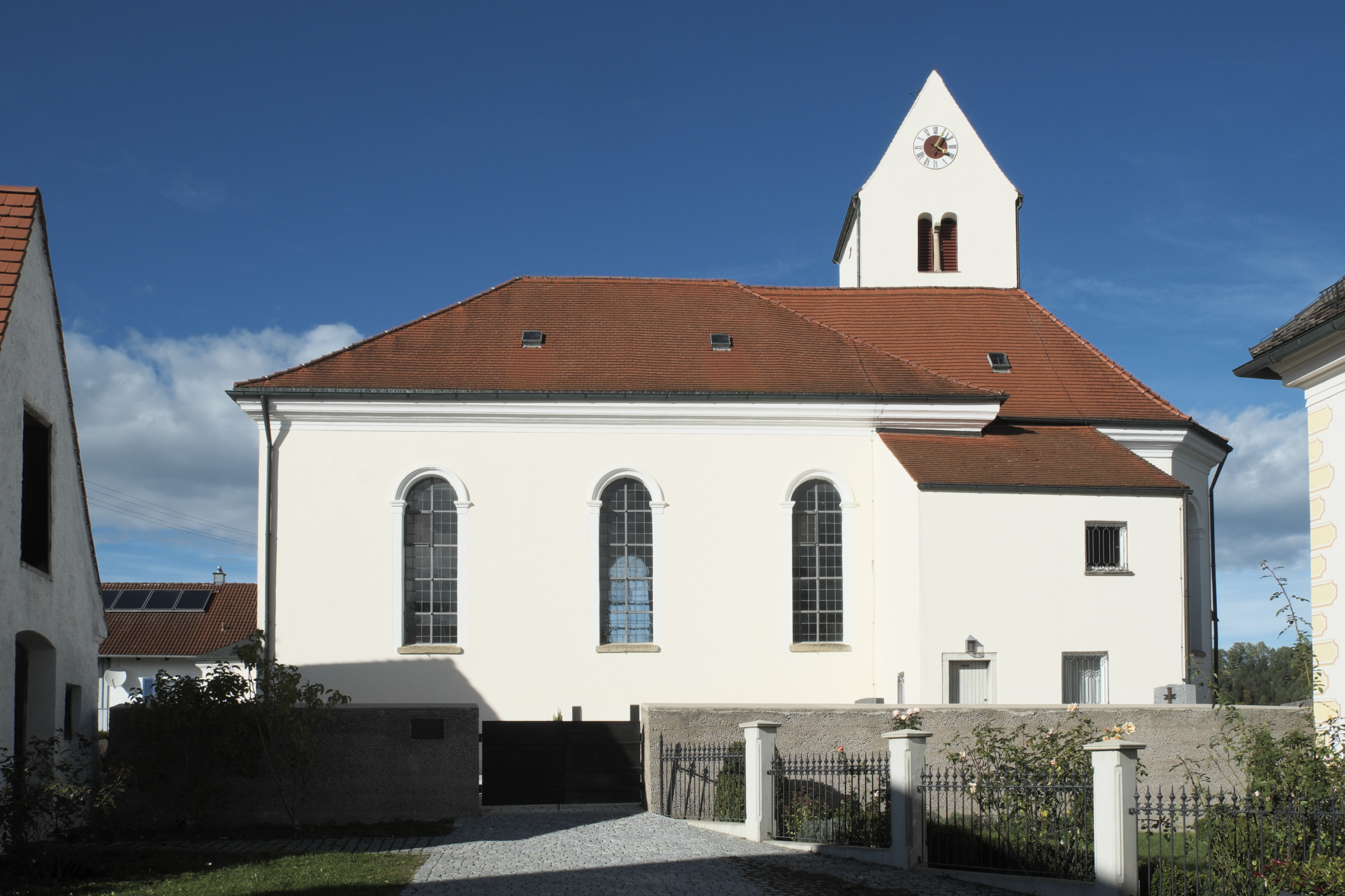 Katholische Pfarrkirche St. Bartholomäus in Epfach (Denklingen) im Landkreis Landsberg am Lech (Bayern/Deutschland)